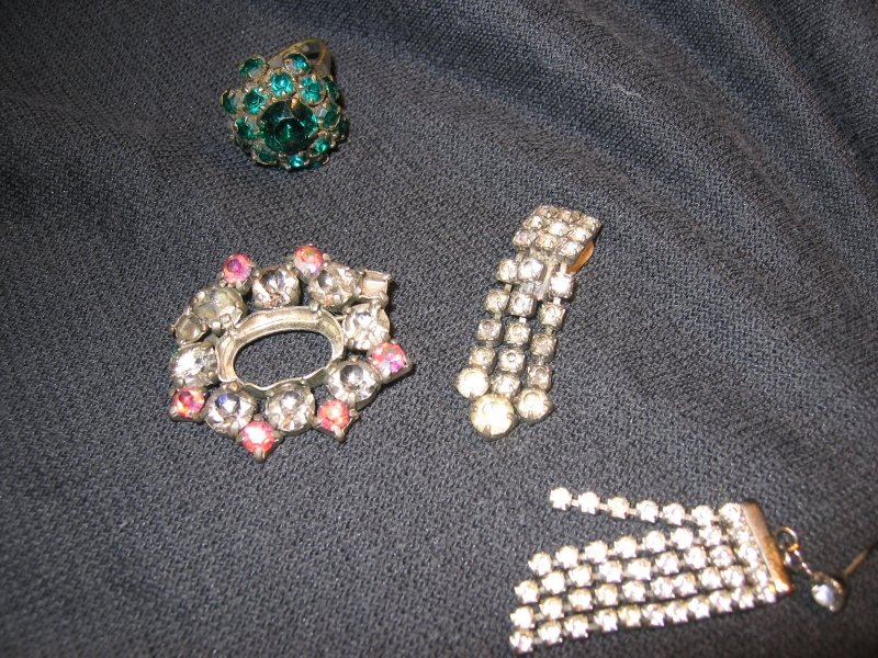 Beispiele für Strassschmuck *Quelle: fotografiert am 25.09.2004 *Fotograf: Pismire